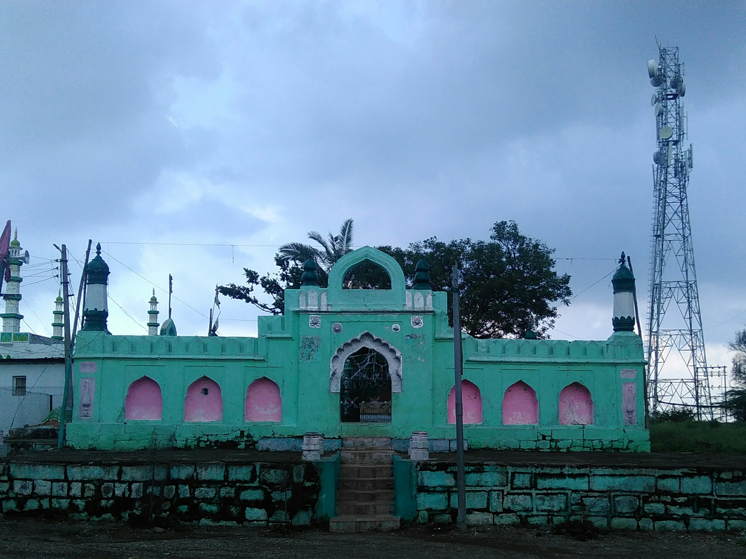 खासगाव मधील मशीद